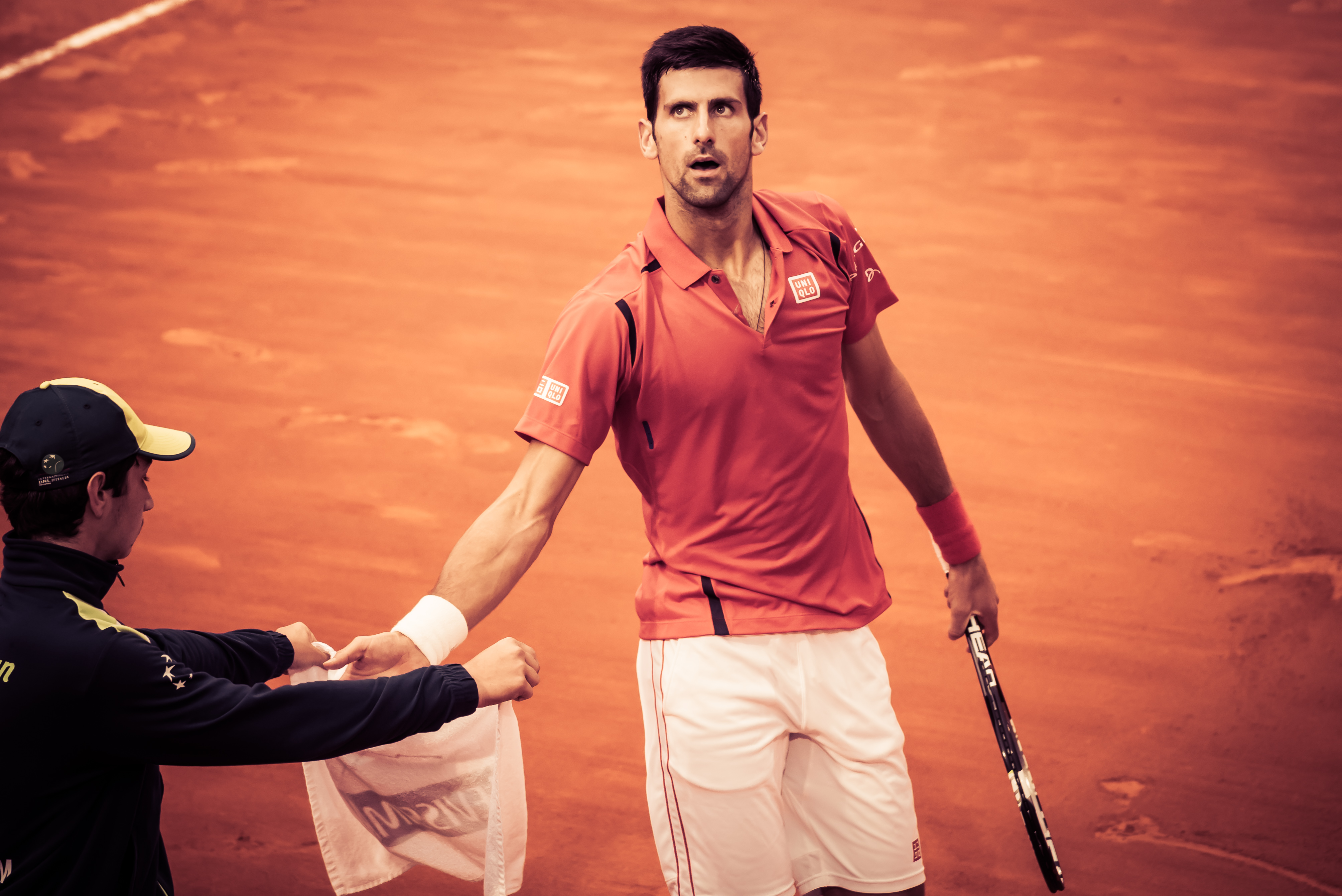 Internazionali BNL d'Italia 2016. Roma. #ibi16